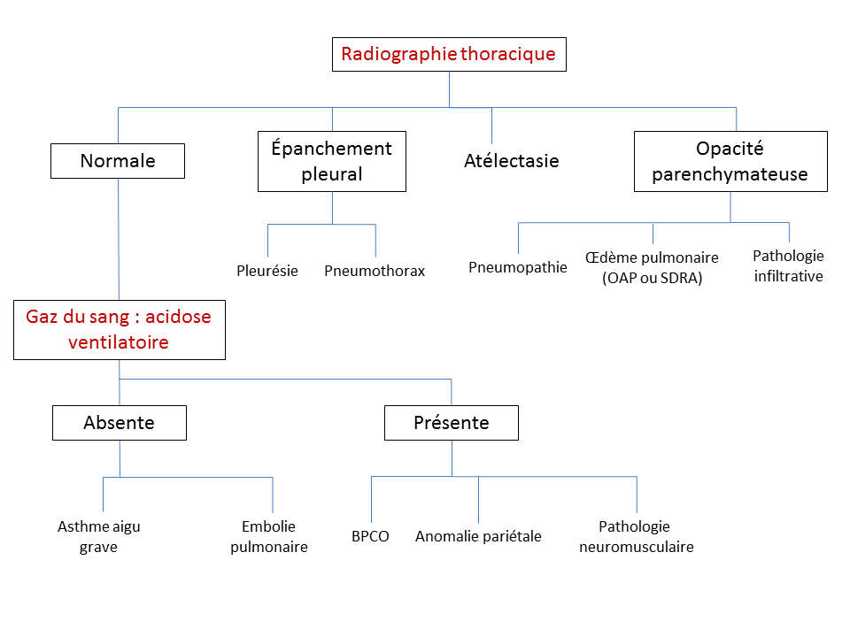 Arbre diagnostic des détresses respiratoires, d'après le Collège des enseignants de Pneumologie 2017 (